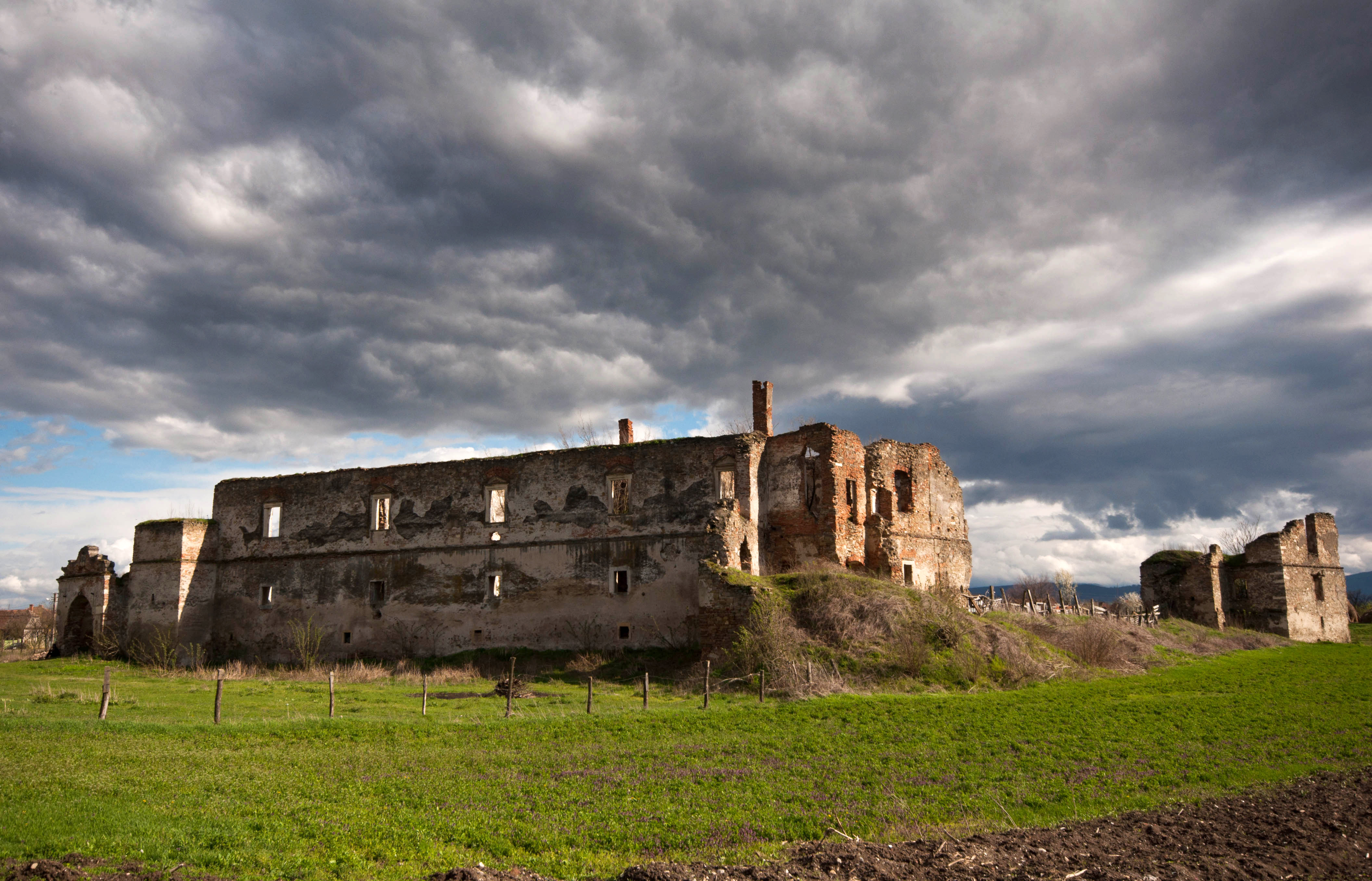 Castelul Martinuzzi se afla pe teritoriul administrativ al comunei Vintu de Jos, a fost construit la mijlocul secolului al XVI-lea de catre guvernatorul Transilvaniei de atunci, Gheorghe Martinuzzi, episcop de Oradea, si a fost folosit drept resedinta a acestuia. Datand din 1550, castelul, ridicat sub forma de cetate, era inconjurat cu valuri de pamant si santuri umplute cu apa. Edificiul a fost ridicat pe fundatiile unei constructii mai vechi. Are o rezonanta sumbra, pentru ca aici a fost asasinat guvernatorul Martinuzzi din ordinul generalului Castaldo in 1551 si a stat inchis, iar apoi ucis, domnitorul Moldovei, Aron Tiranul (1595-1597). Castelul era considerat un exemplu tipic de Renastere transilvaneana si a fost ridicat dupa planurile arhitectului italian Dominico da Bologna.